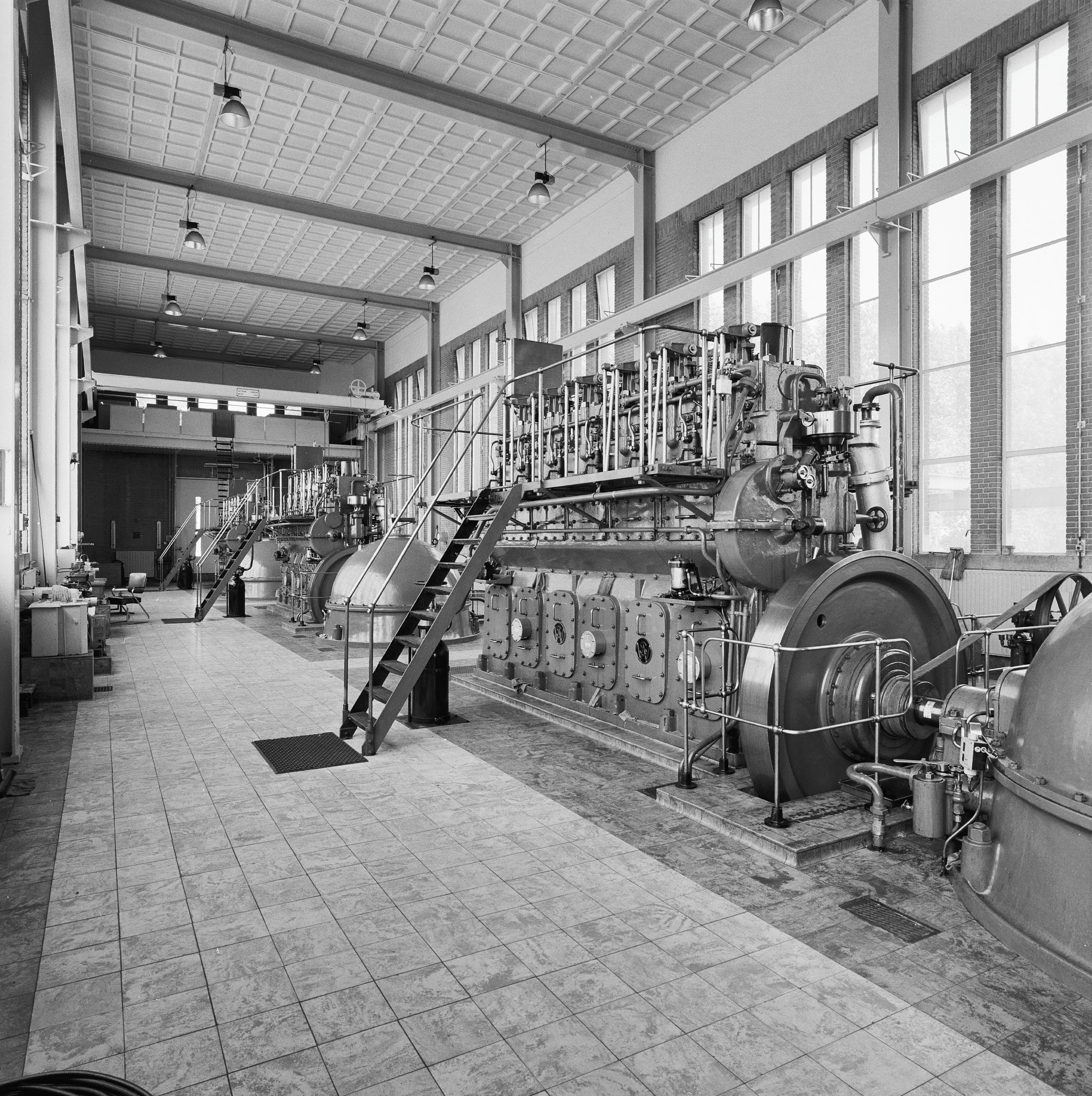 Dieselgemaal Mr. P.A. Pijnacker Hordijk: Interieur, overzicht met centrifugaalpompen (opmerking: Gefotografeerd voor De Nederlandse Monumenten van Geschiedenis en Kunst, Gouda)